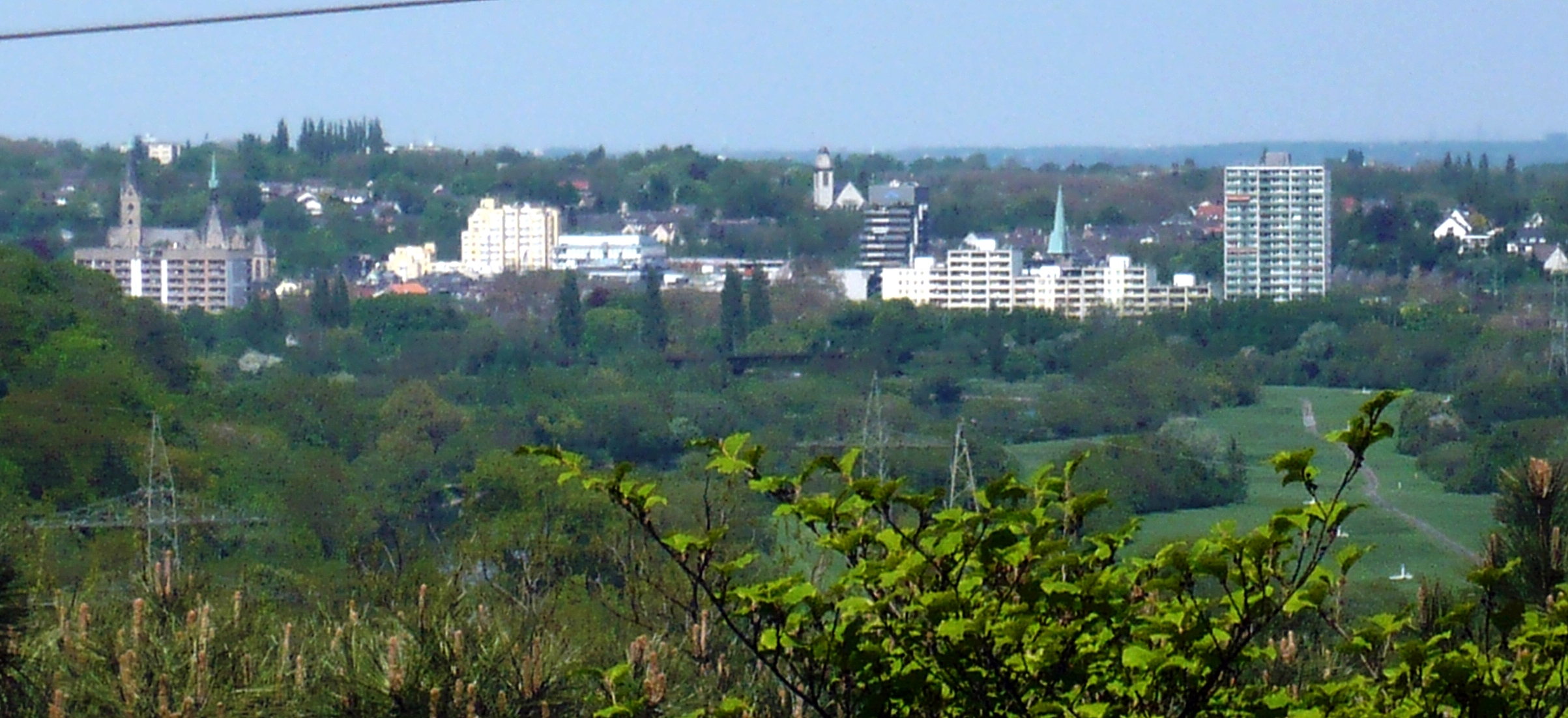 Stadtteil Essen-Steele